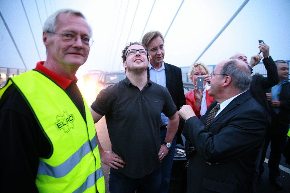 So lautet die Aufschrift auf dem riesigen Transparent, das am 4. Juli von der Rügendamm-Brücke bei Stralsund entrollt wurde und mit dem DIE LINKE zum Ferienstart auf die in Mecklenburg-Vorpommerns Tourismussektor gezahlten Billiglöhne aufmerksam machen wollte. Gregor Gysi kritisierte vor Ort die Lohnbedingungen im nordostdeutschen Gastgewerbe als 'unter aller Würde'. Foto: v.l.n.r. André Brie, Steffen Bockhahn, Dietmar Bartsch, Martina Bunge, Gregor Gysi